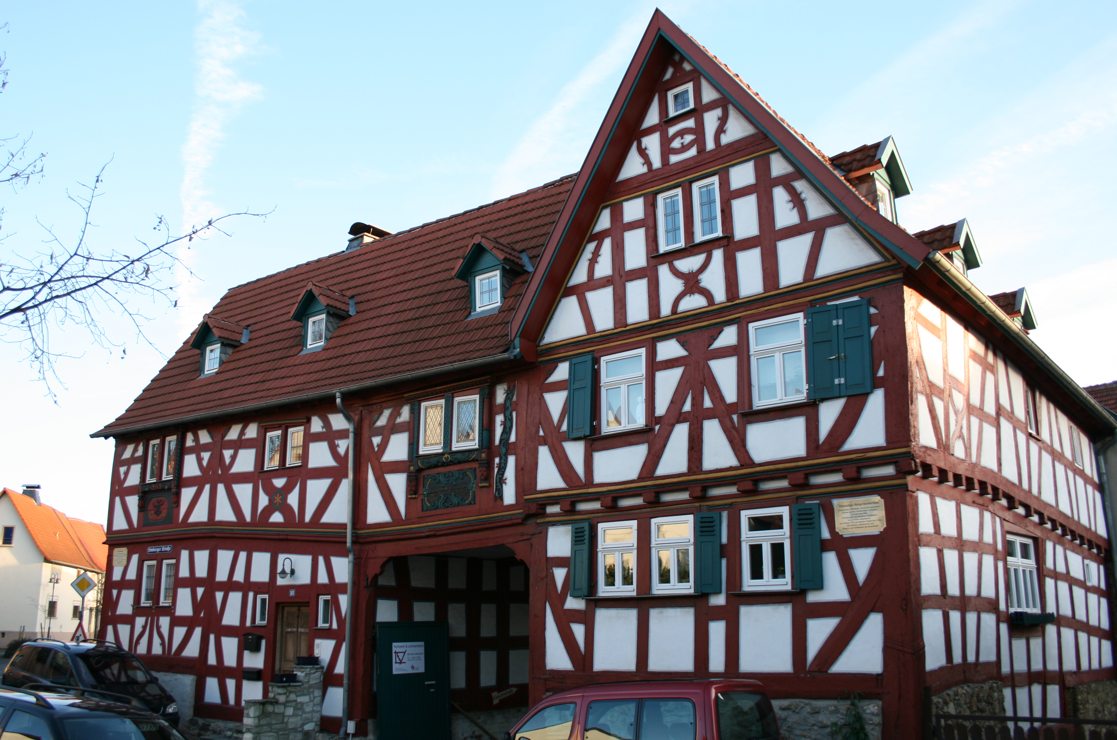 Altes Bürgermeisterhaus in Bad Camberg-Erbach, Deutschland